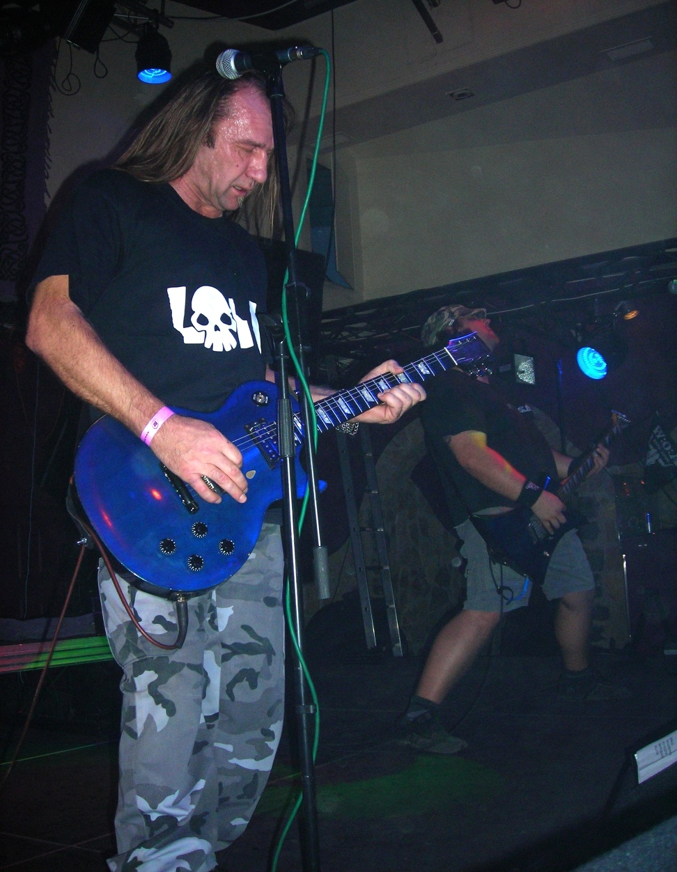 Koncerten az Aurora zenekar (Budapest, Avalon Club)